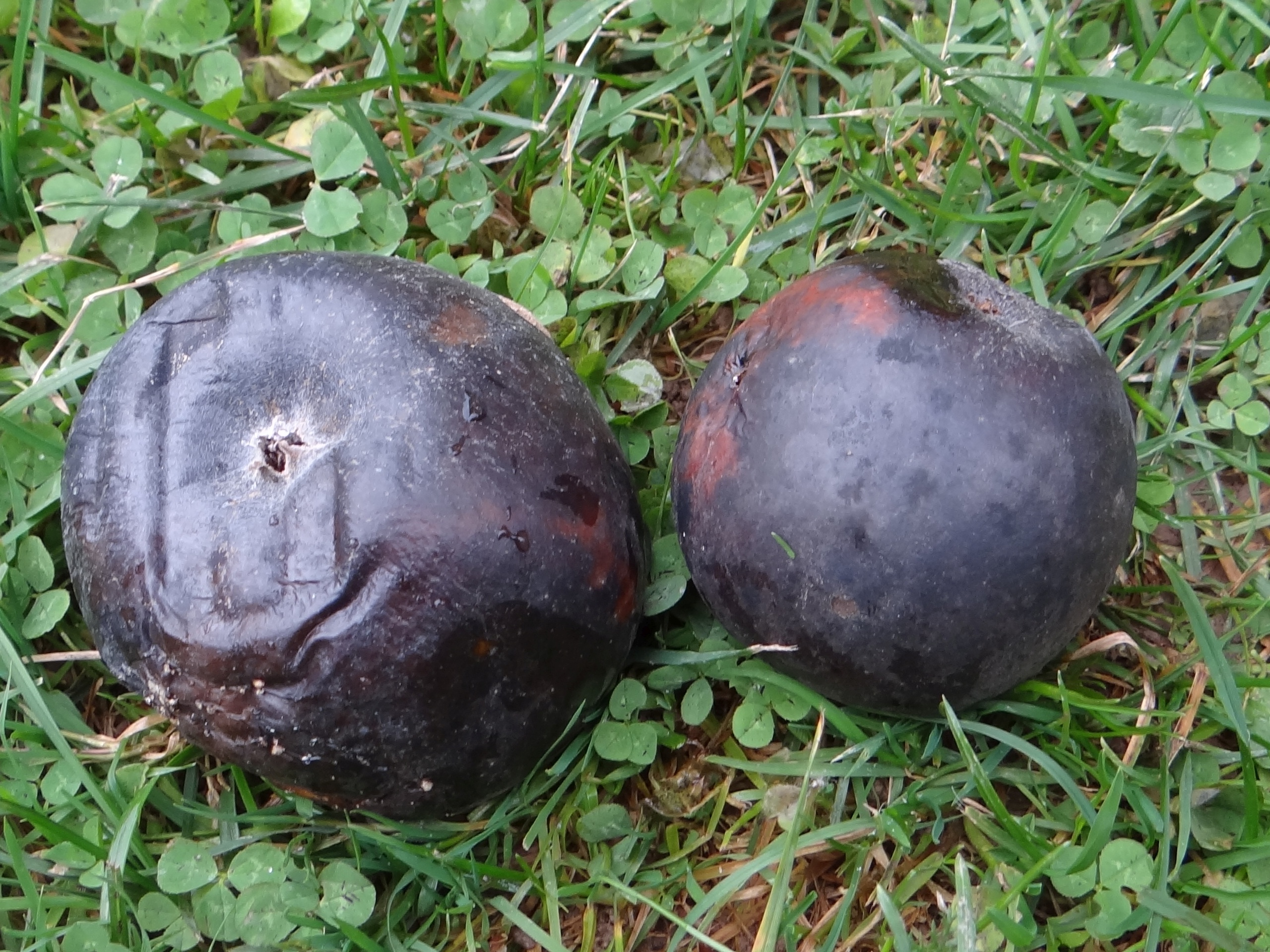 Monilinia fructigena on Malus domestica